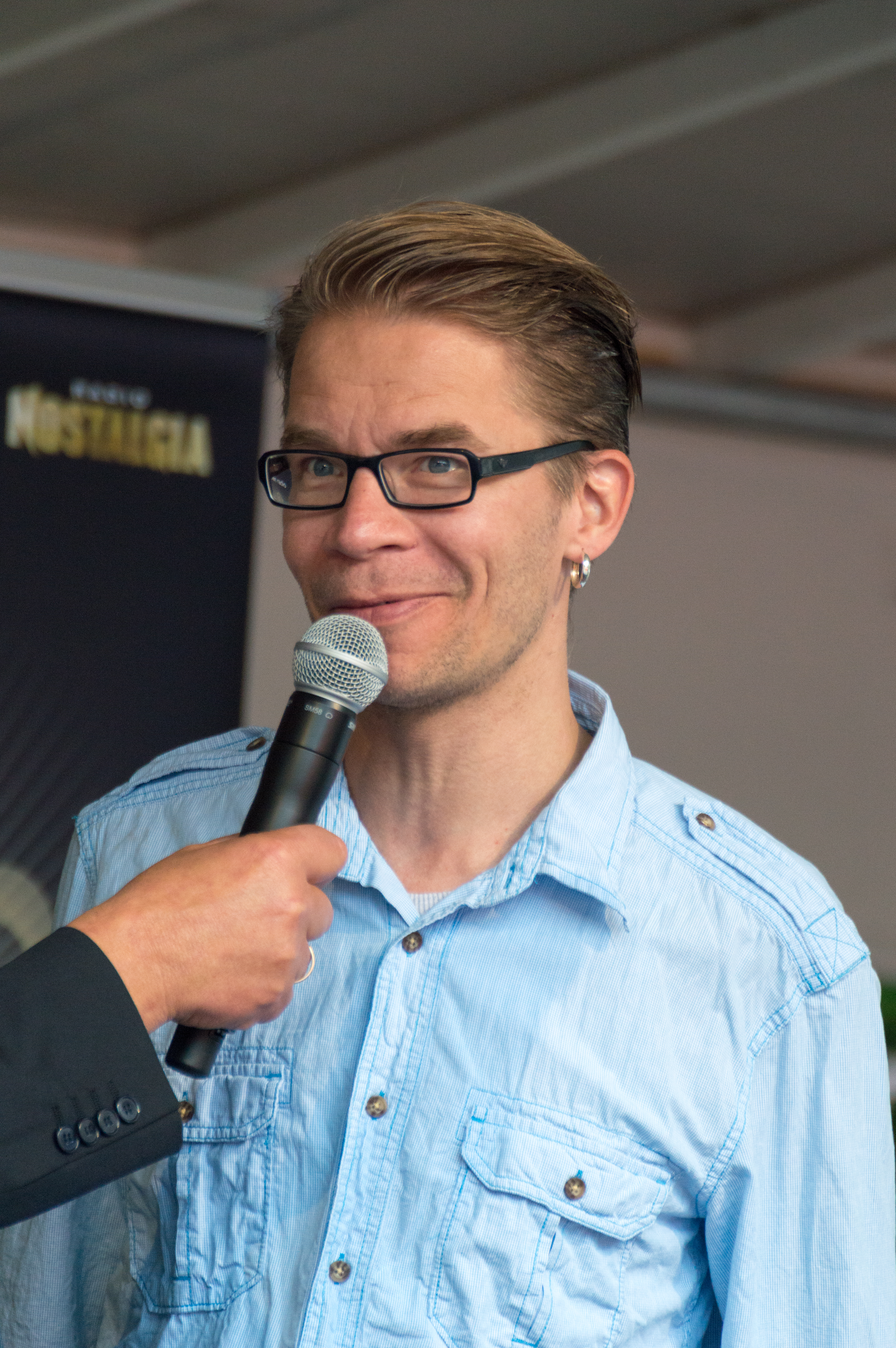 Ville Pusa suomalainen laulaja